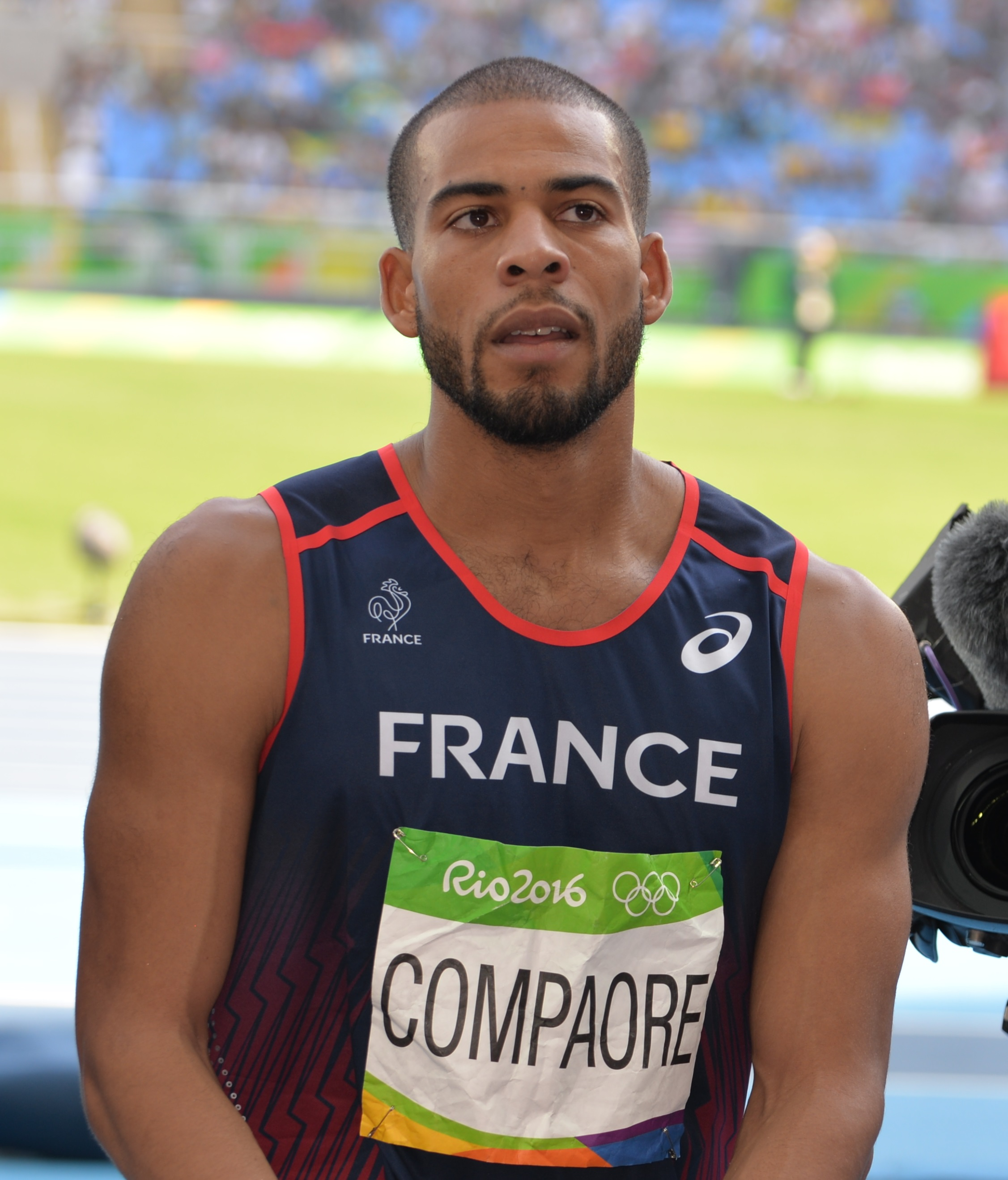 Benjamin Compaoré dans la finale du triple saut au stade olympique aux jo de Rio 2016